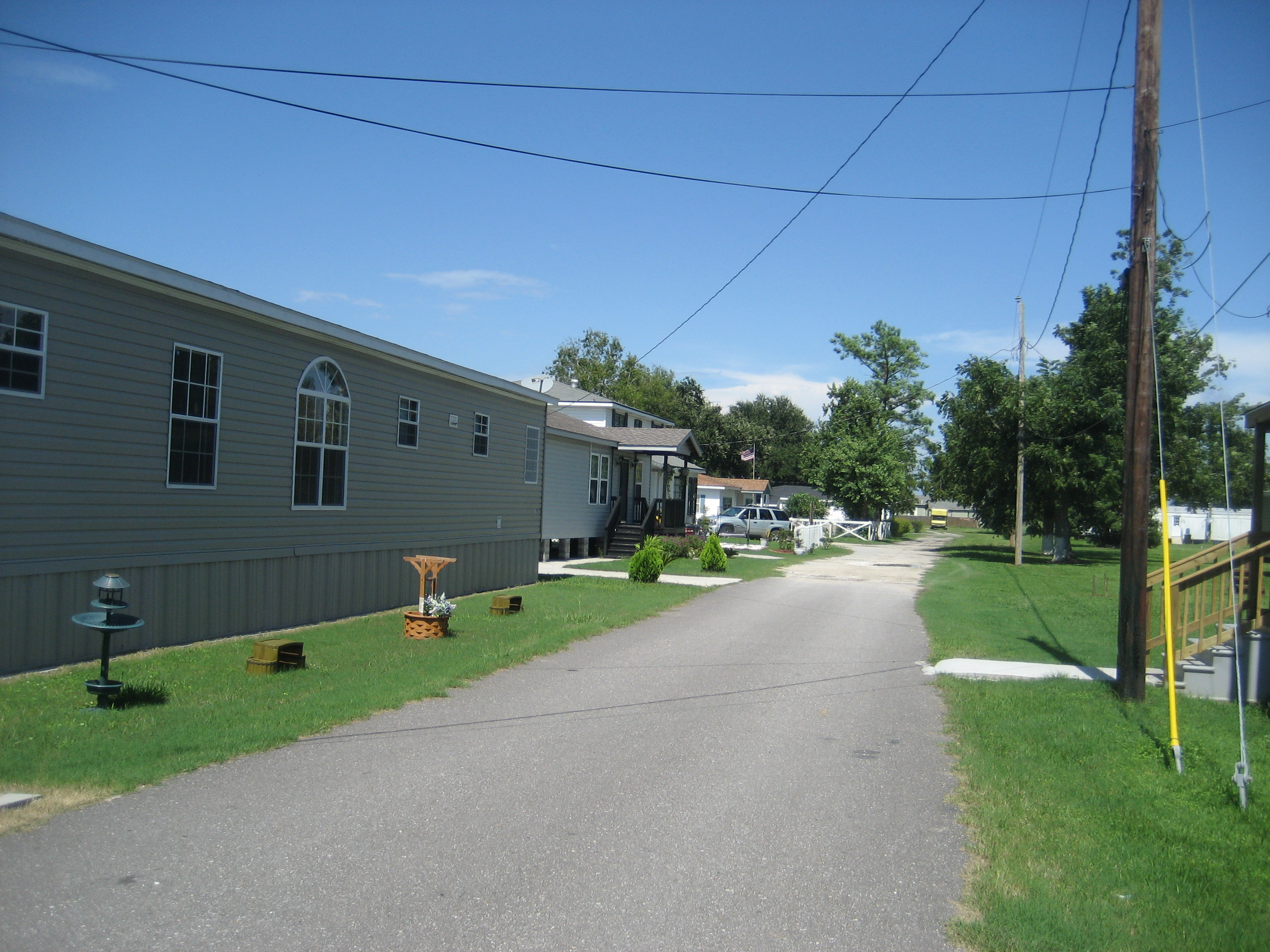 Phoenix, Louisiana.